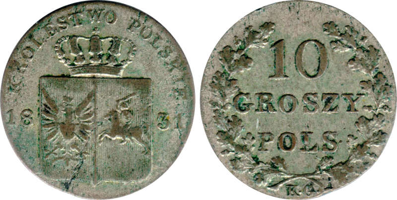 10 groszy polskich 1831 lapy orla proste